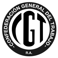 Logo de la Confederación General del Trabajo de la República Argentina